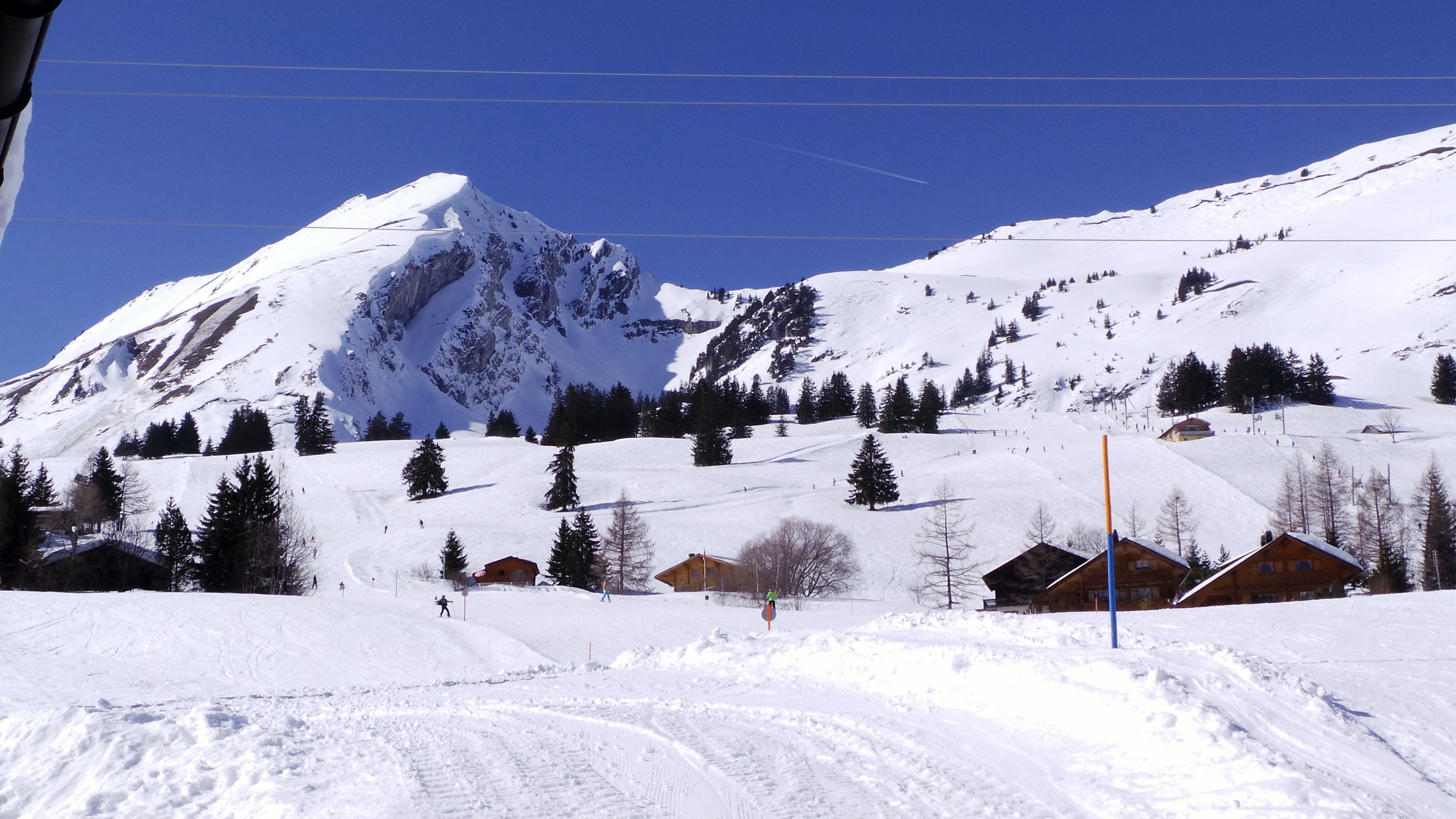 Col des Mosses